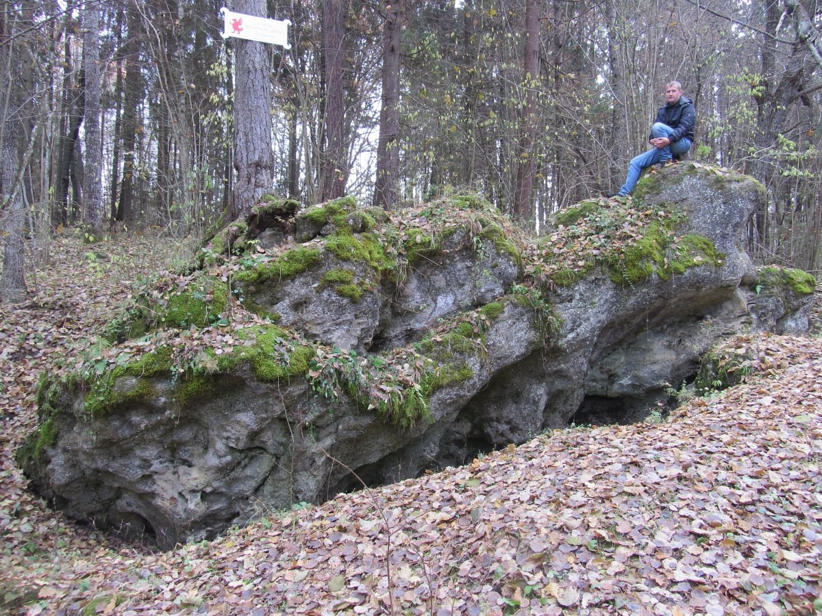 Гогалеўка. Змееў камень - ушаноўваемы камень бронзавага перыяду This is a photo of Belarusian heritage monument. Reference number: 213В000817 ( WLM)